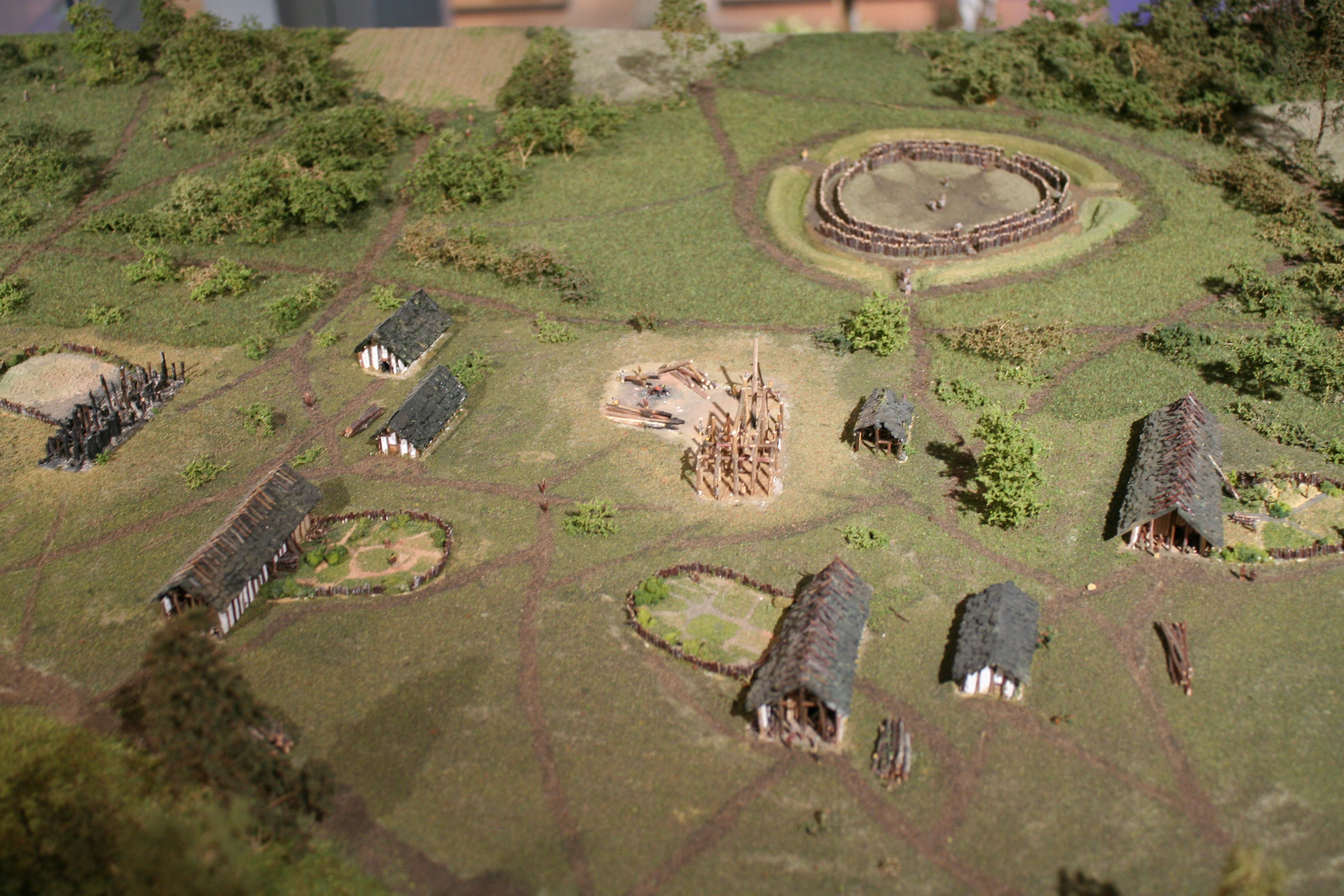 Modell der stichbandkeramischen Siedlungslandschaft mit Kreisgrabenanlagen in Dresden-Nickern; Staatliches Museum für Archäologie Chemnitz